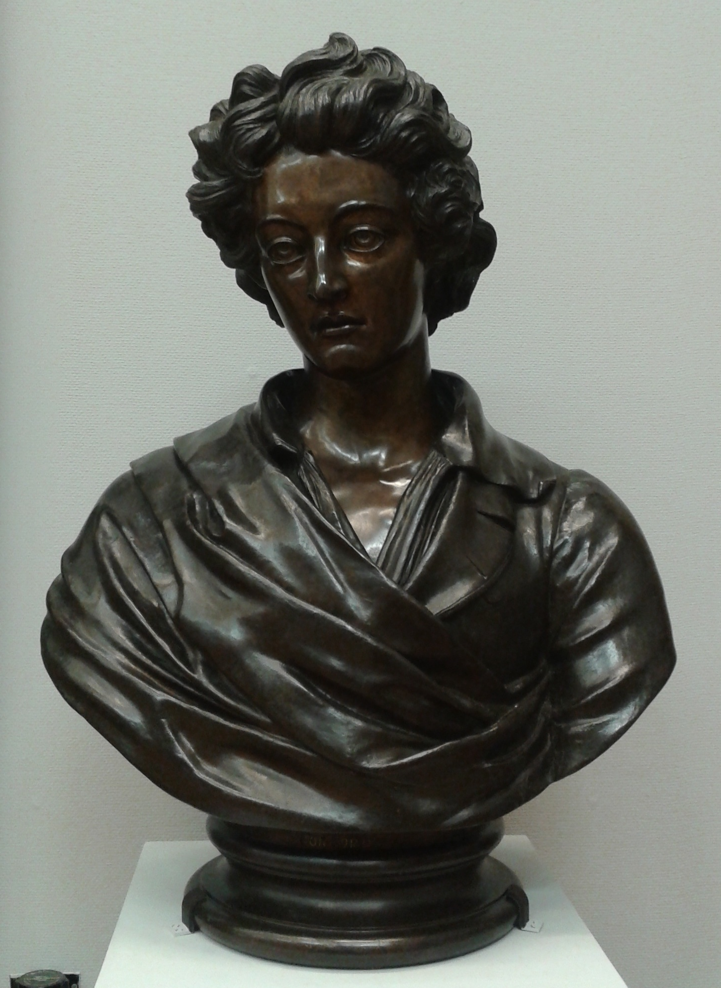 Bust de Percy Shelley conservat a la Tate Britain de Londres